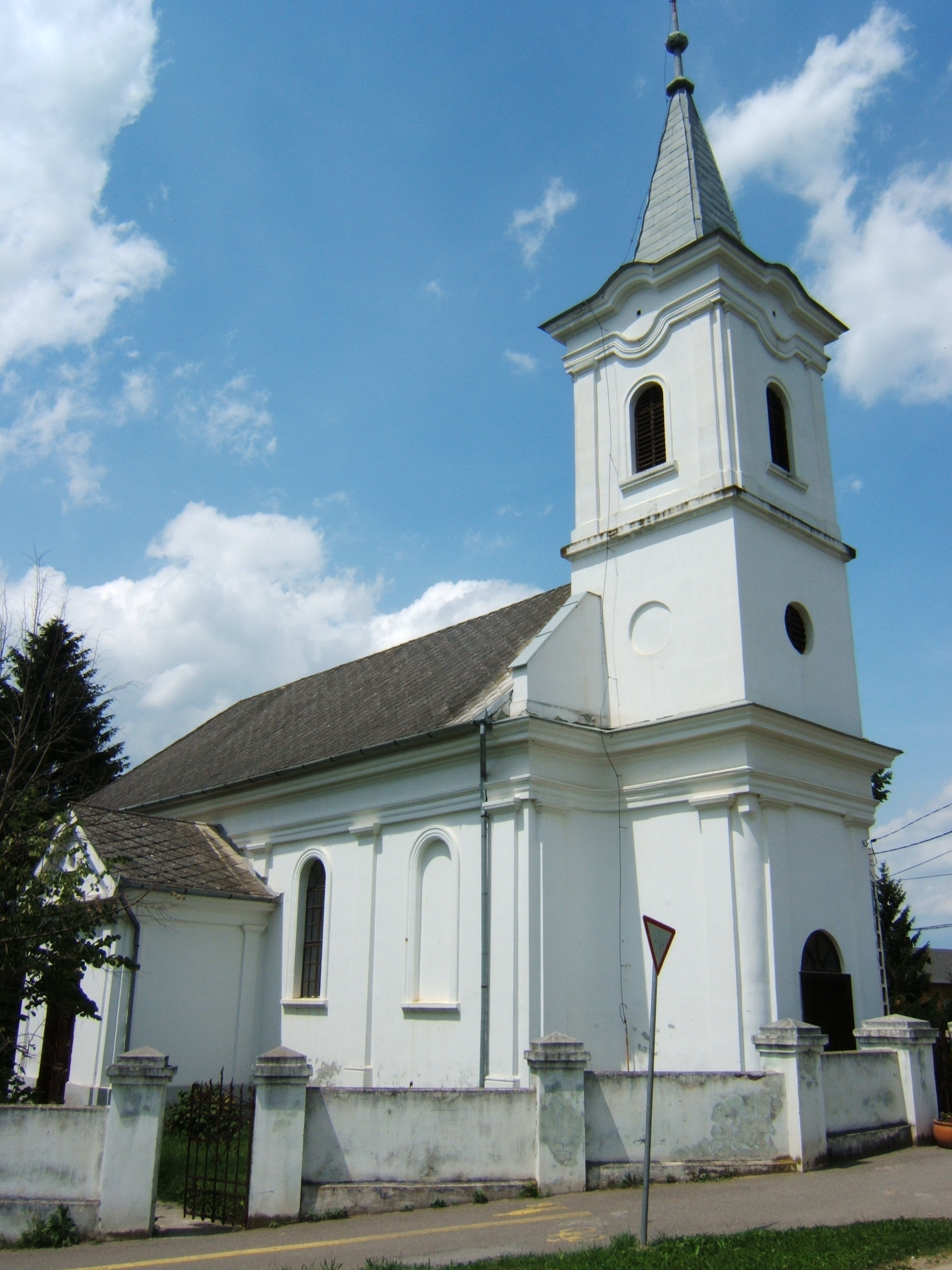 Zselickisfalud, református templom